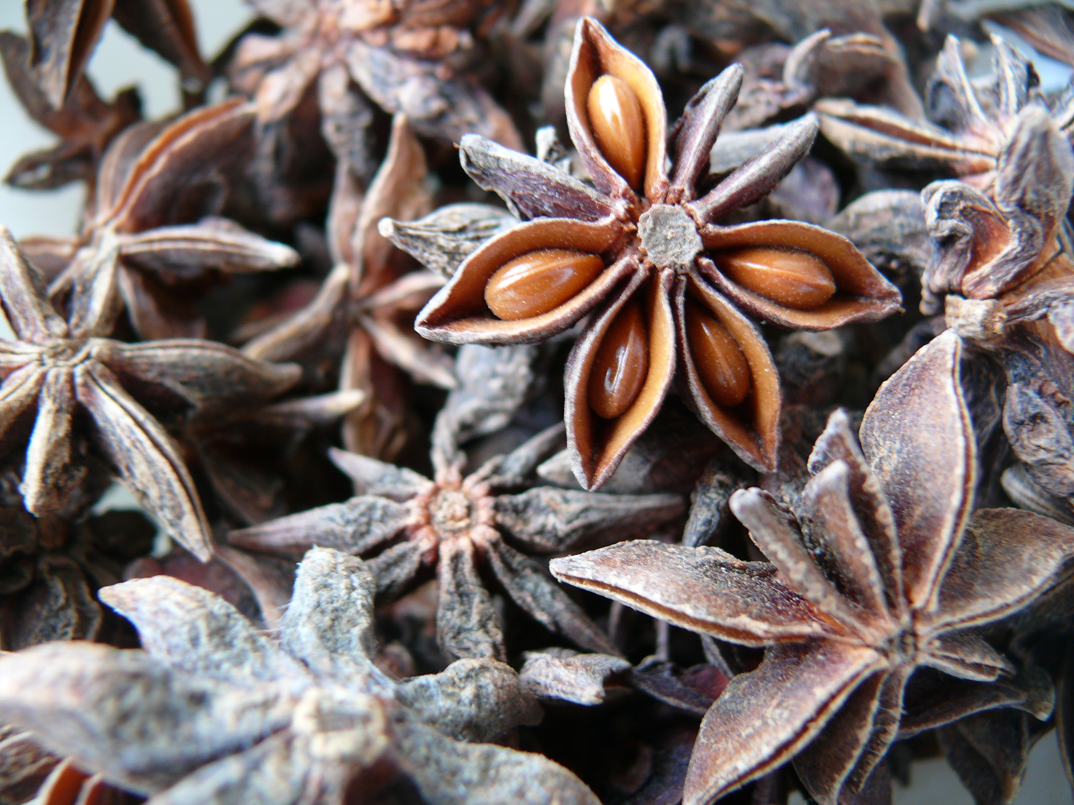 Illicium verum